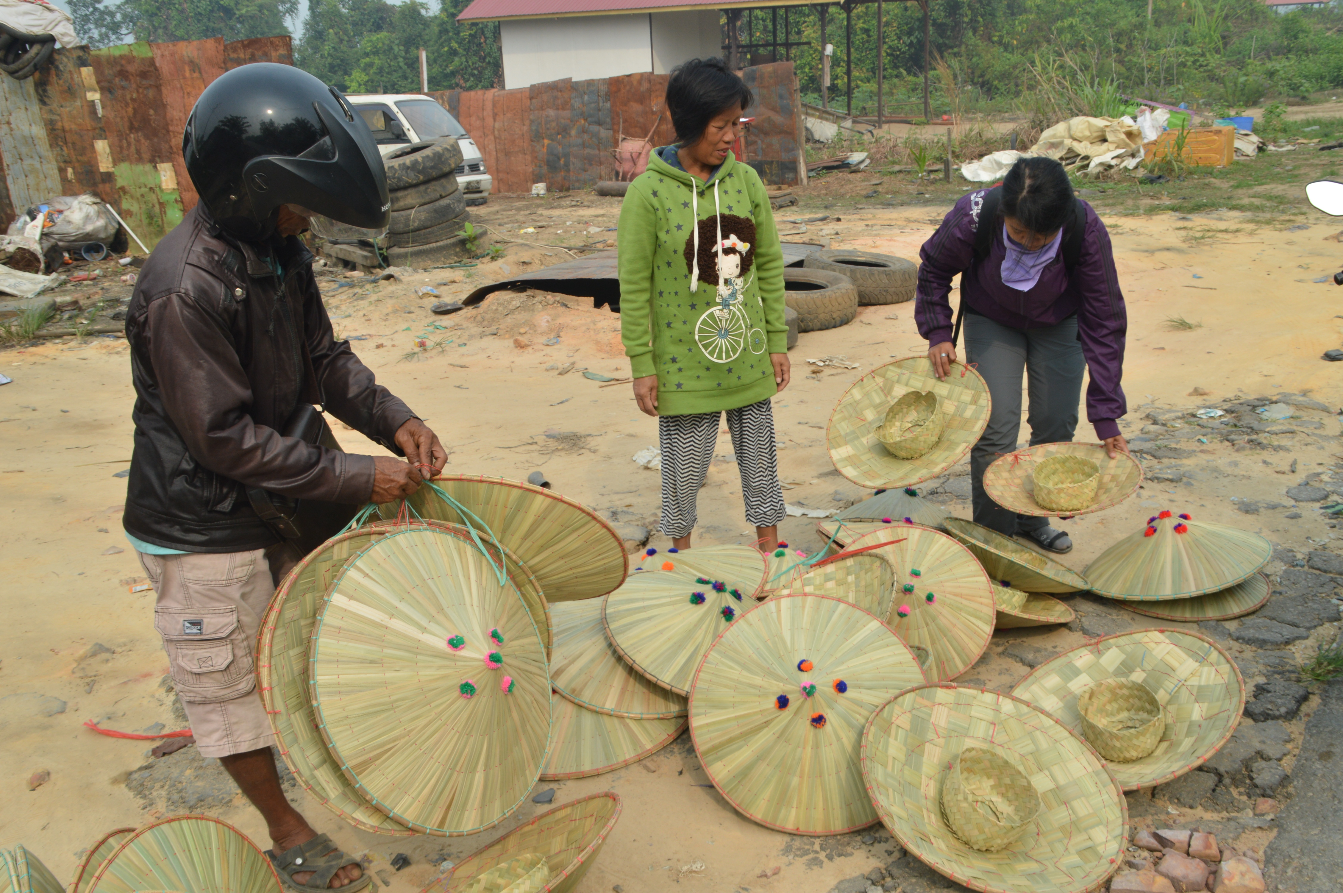 Para calon pembeli sedang memilih seraung. Seraung adalah caping khas masyarakat Kutai.